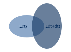 Evoluzione di un dominio fluido nel tempo, per dimostrazione teorema di reynolds del trasporto.